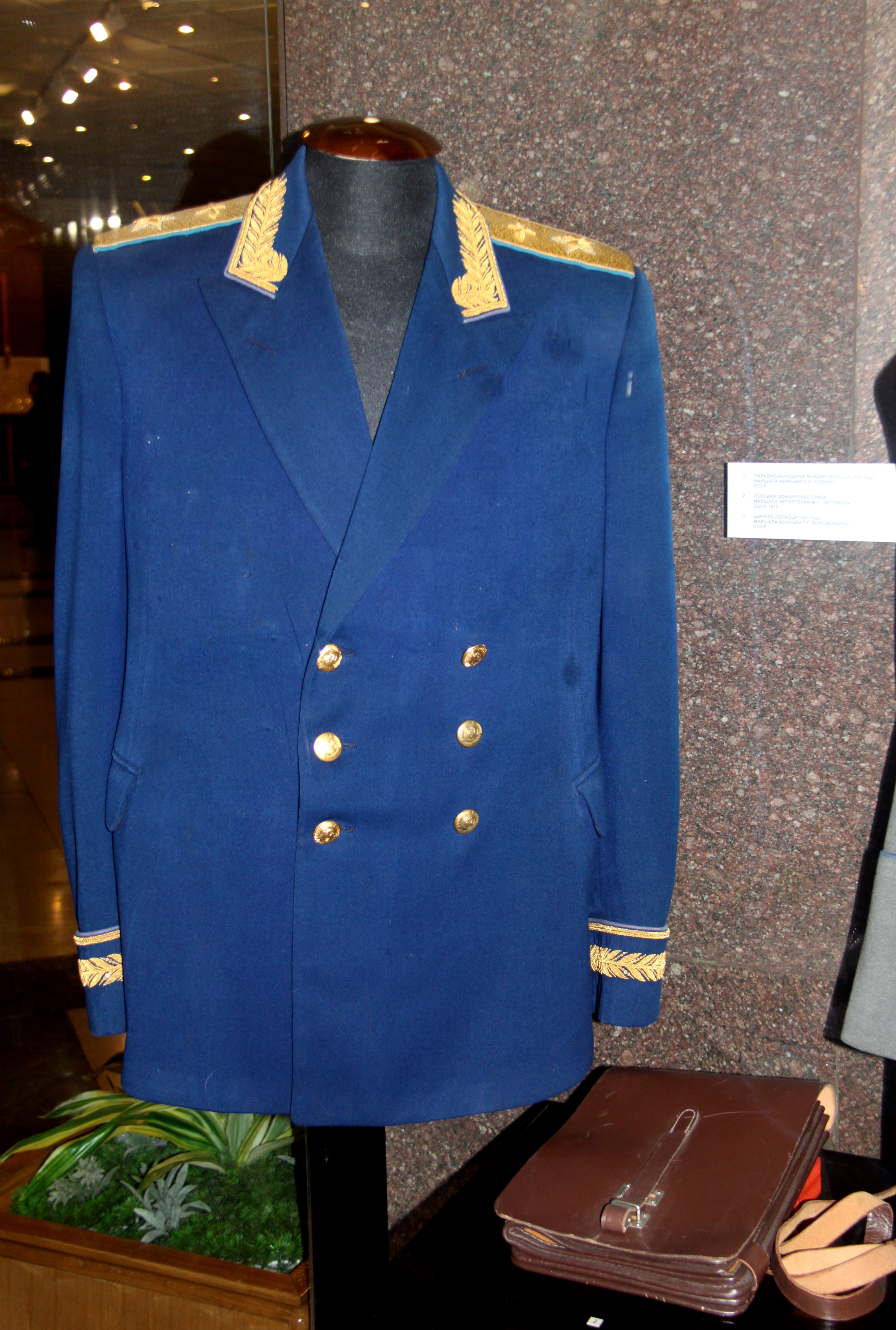 Парадно-выходной мундир образца 1954 года Маршала авиации С. И. Руденко